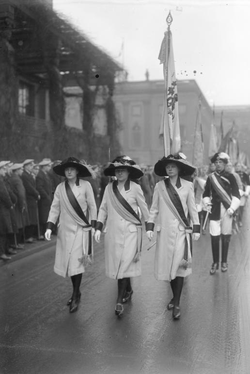 Reichsgründungsfeier der Studentenschaft am 18. Januar in der Universität zu Berlin ! Die weiblichen Chargierten auf dem Wege zur Feier nach der Universitäts-Aula Unter den Linden.